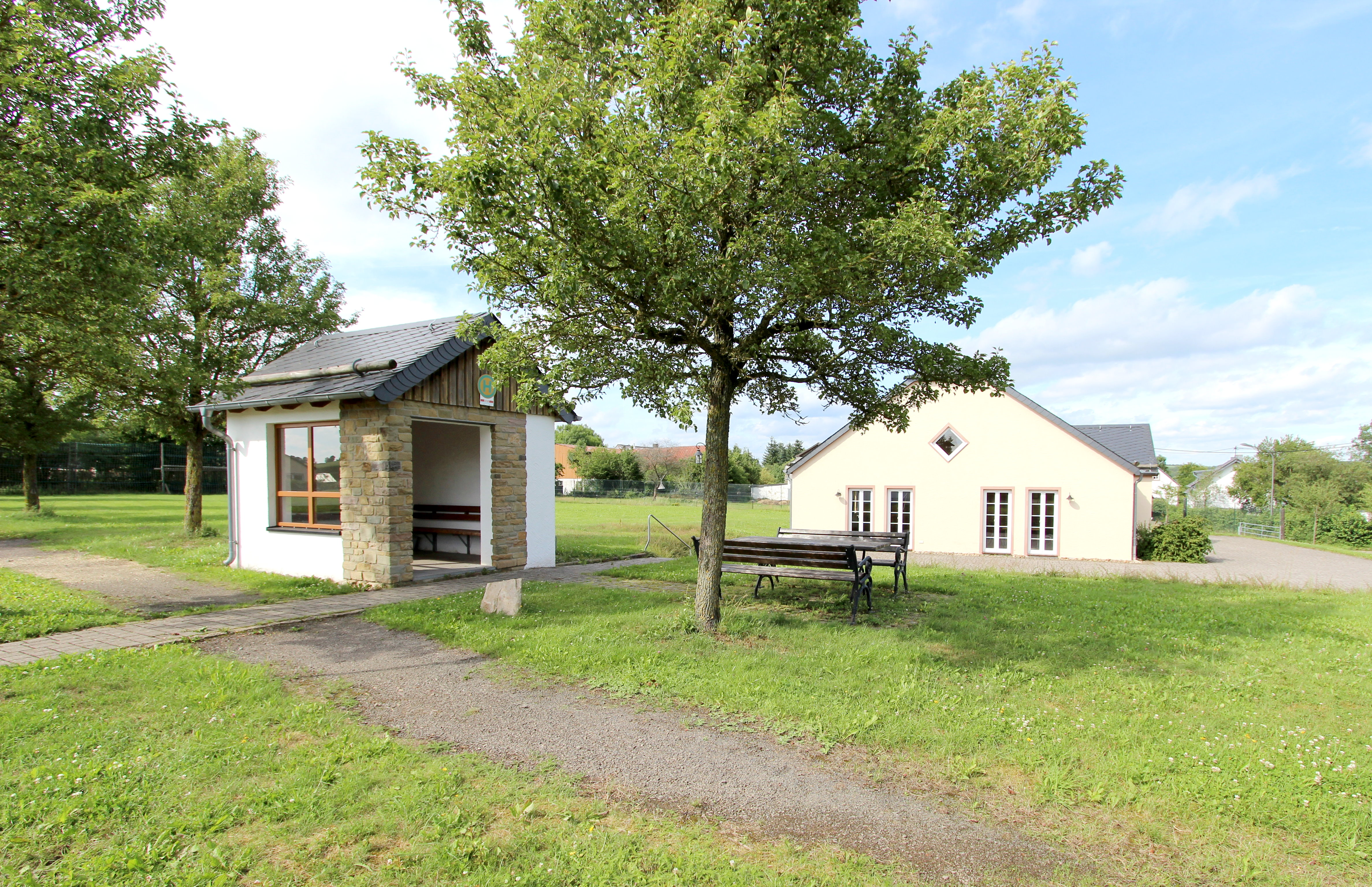 54608 Oberlascheid, Ortskern. Gemeindeplatz mit Kirche, Gemeinschaftshaus und Bushaltestelle. Aufnahme von 2017.